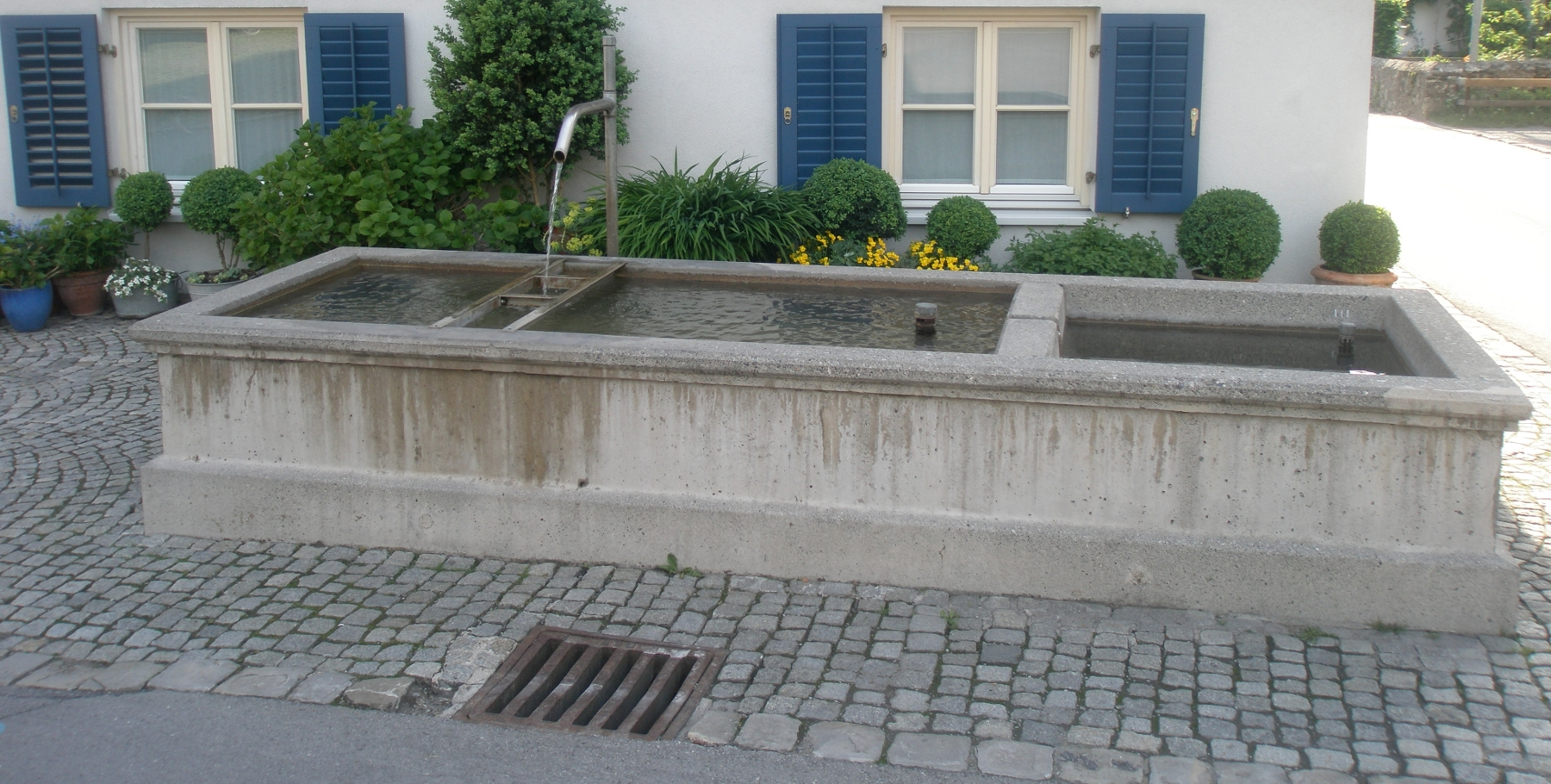 Brunnen im Dorfzentrum von Haselstauden.